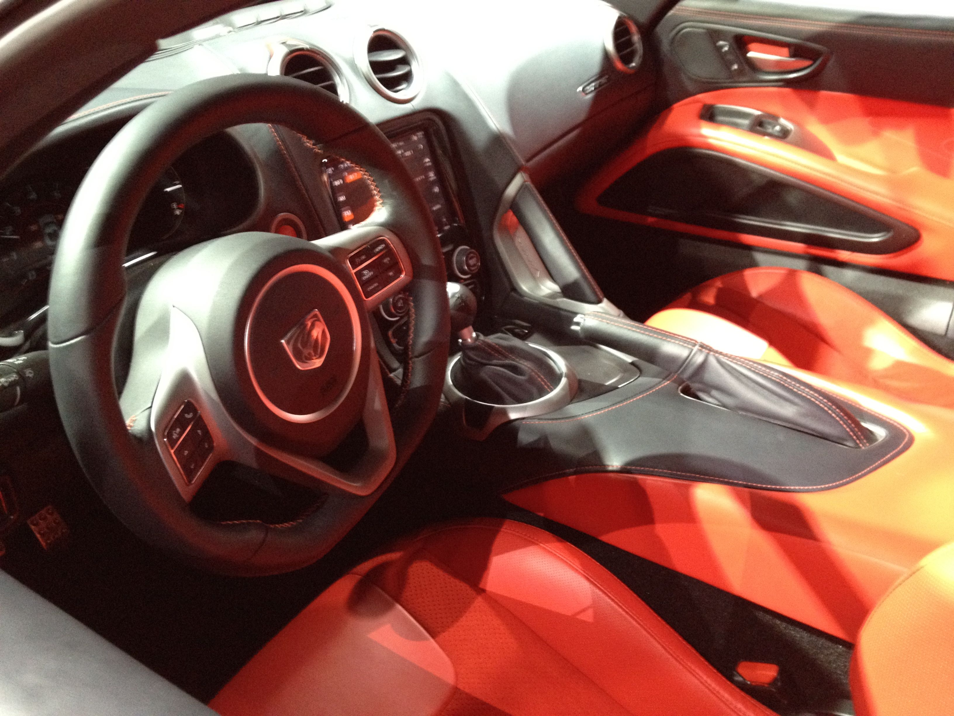 Interni di Una SRT Viper